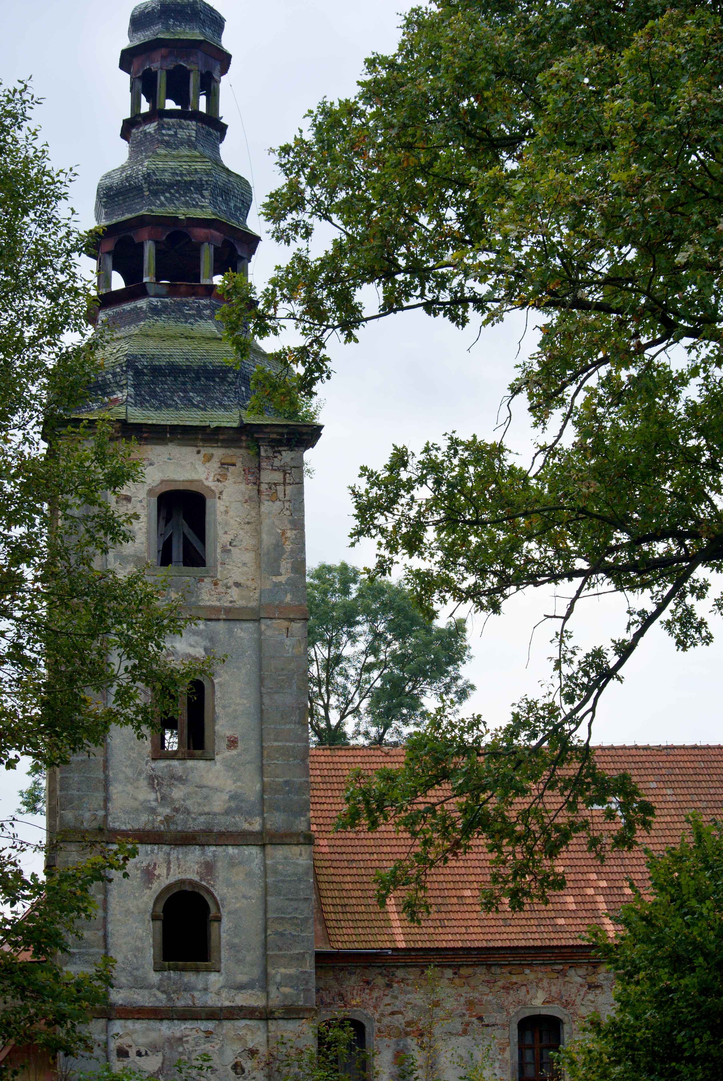 Kostel svatých Šimona a Judy, Žibřidice.